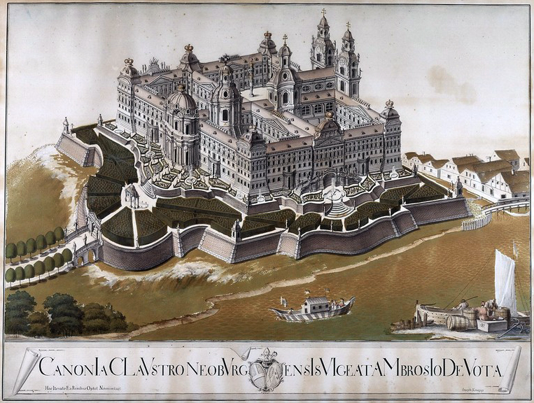 Idealansicht des barocken Umbauprojekts von Stift Klosterneuburg von Donato Felice d’Allio, aquarellierte Federzeichnung